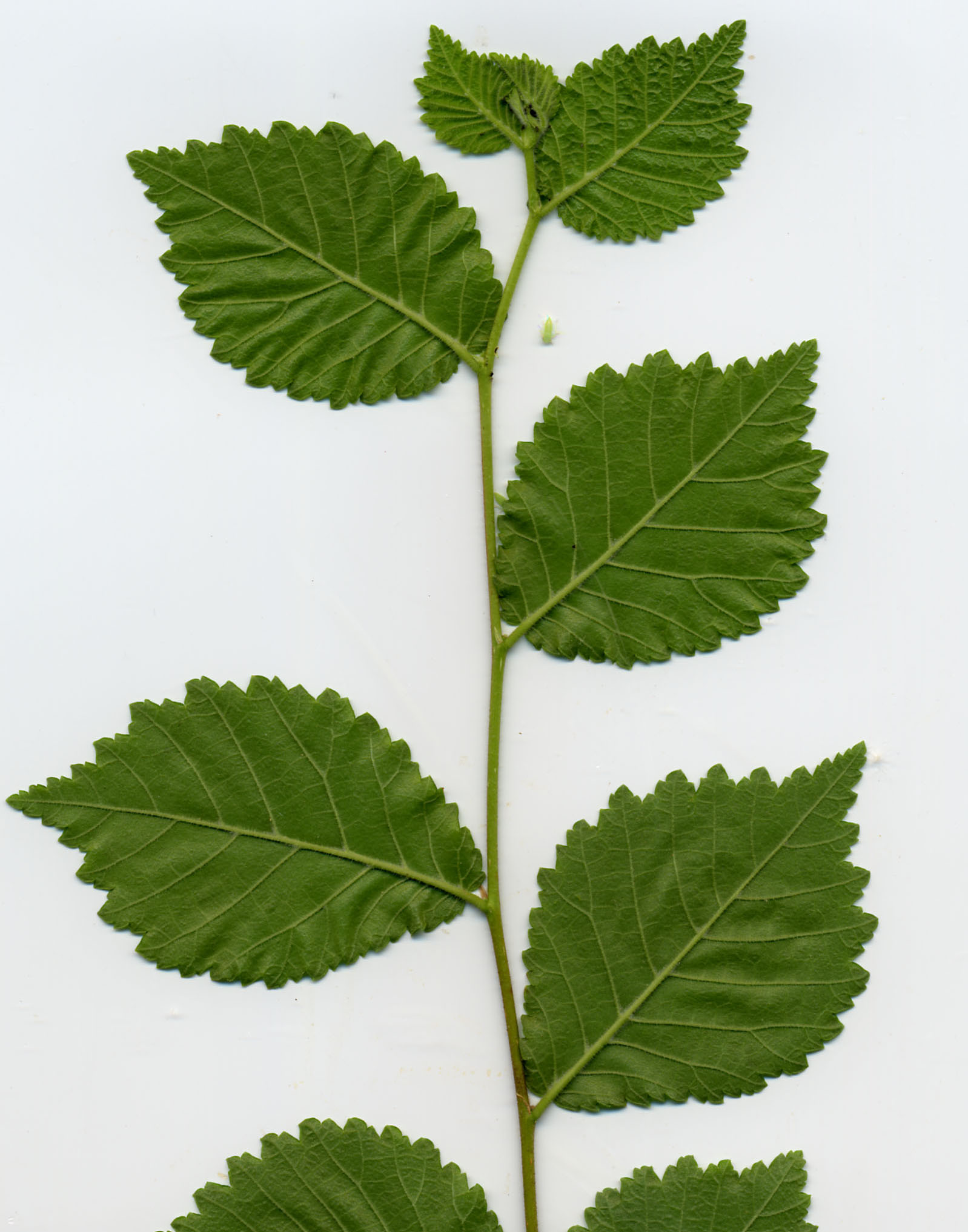 rameau d'orme (ulmus) montrant les feuilles dissymétriques